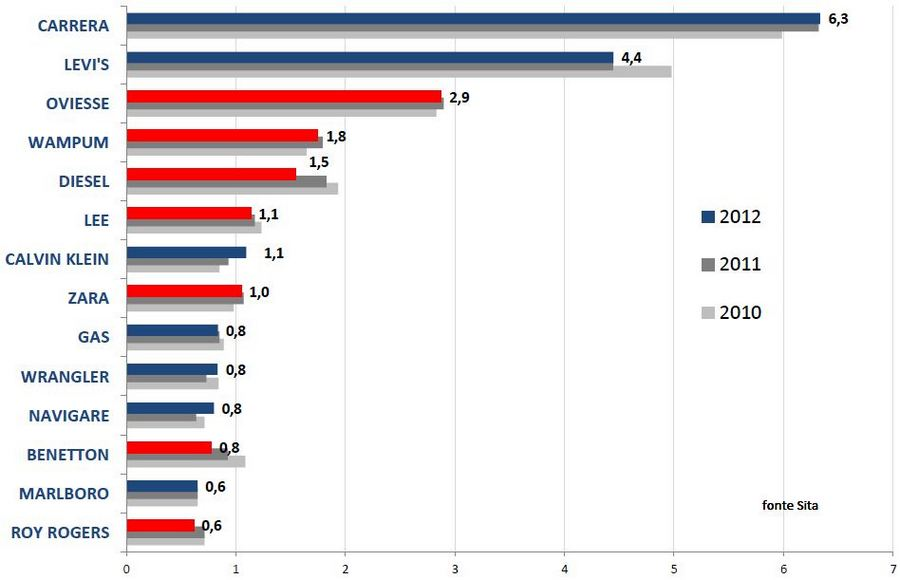 Доля рынка продажи мужских джинсов на территории Италии.